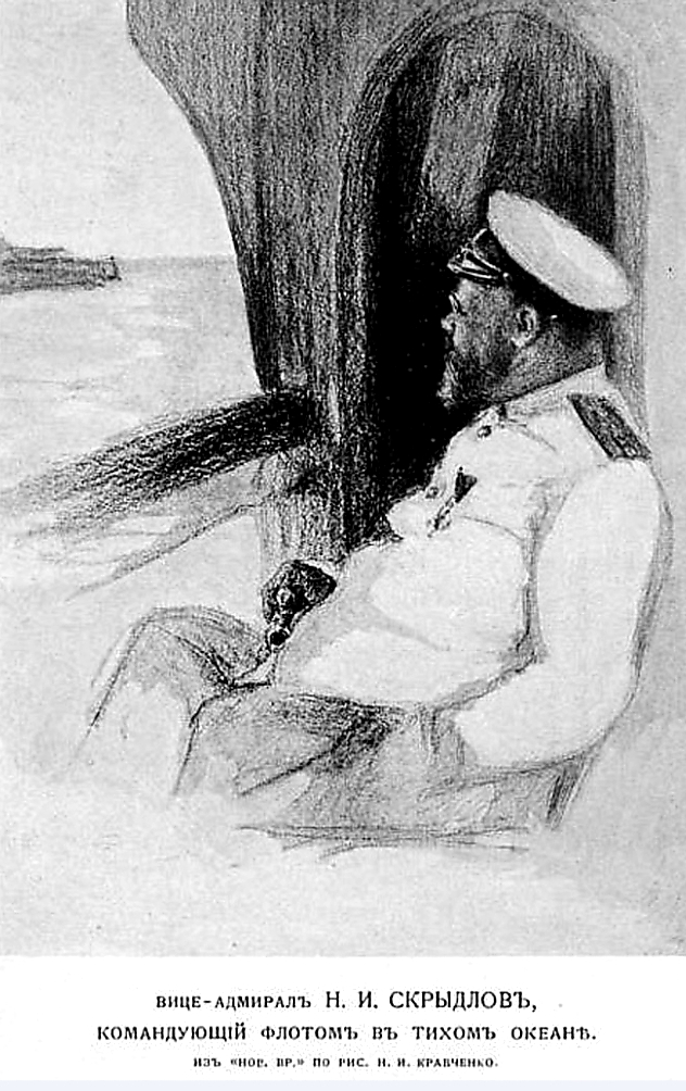 Художник Н.И.Кравченко